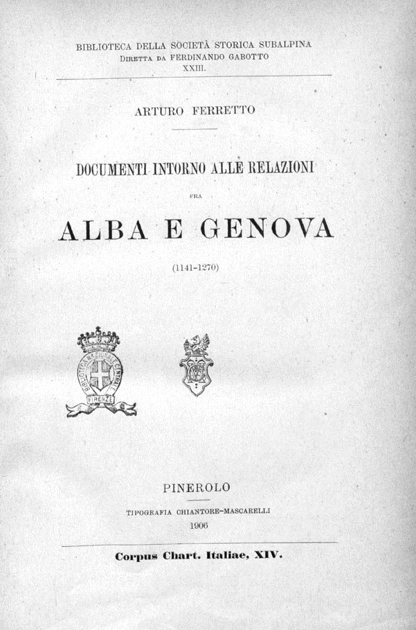 Frontespizio